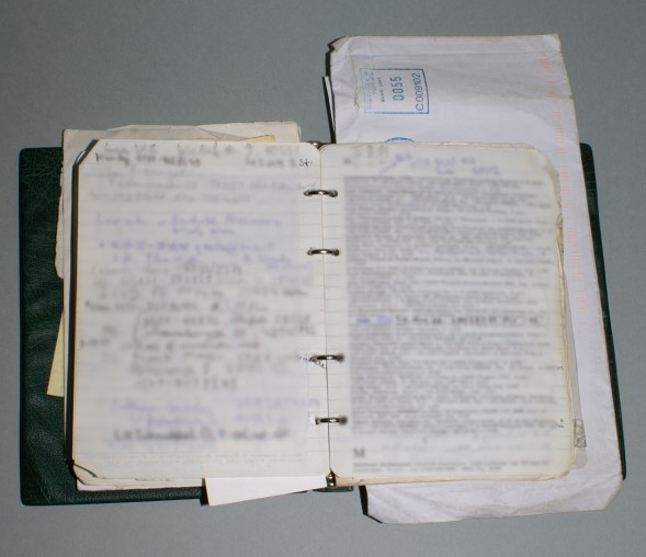 privates Adressbuch, vielen Dank an Maha für das zur Verfügungstellen seines prächtigen Exemplars